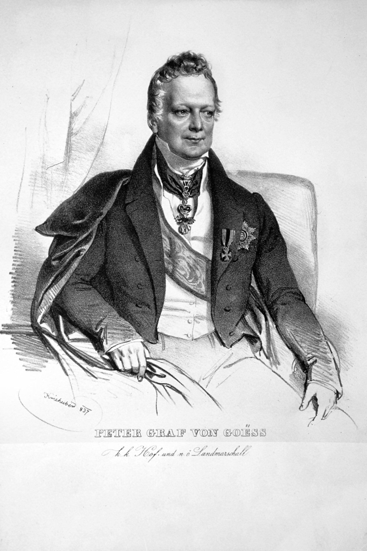 Peter Goess (1774-1846), Graf, Vliessritter, Obersthofmeister Lithographie von Josef Kriehuber, 1837